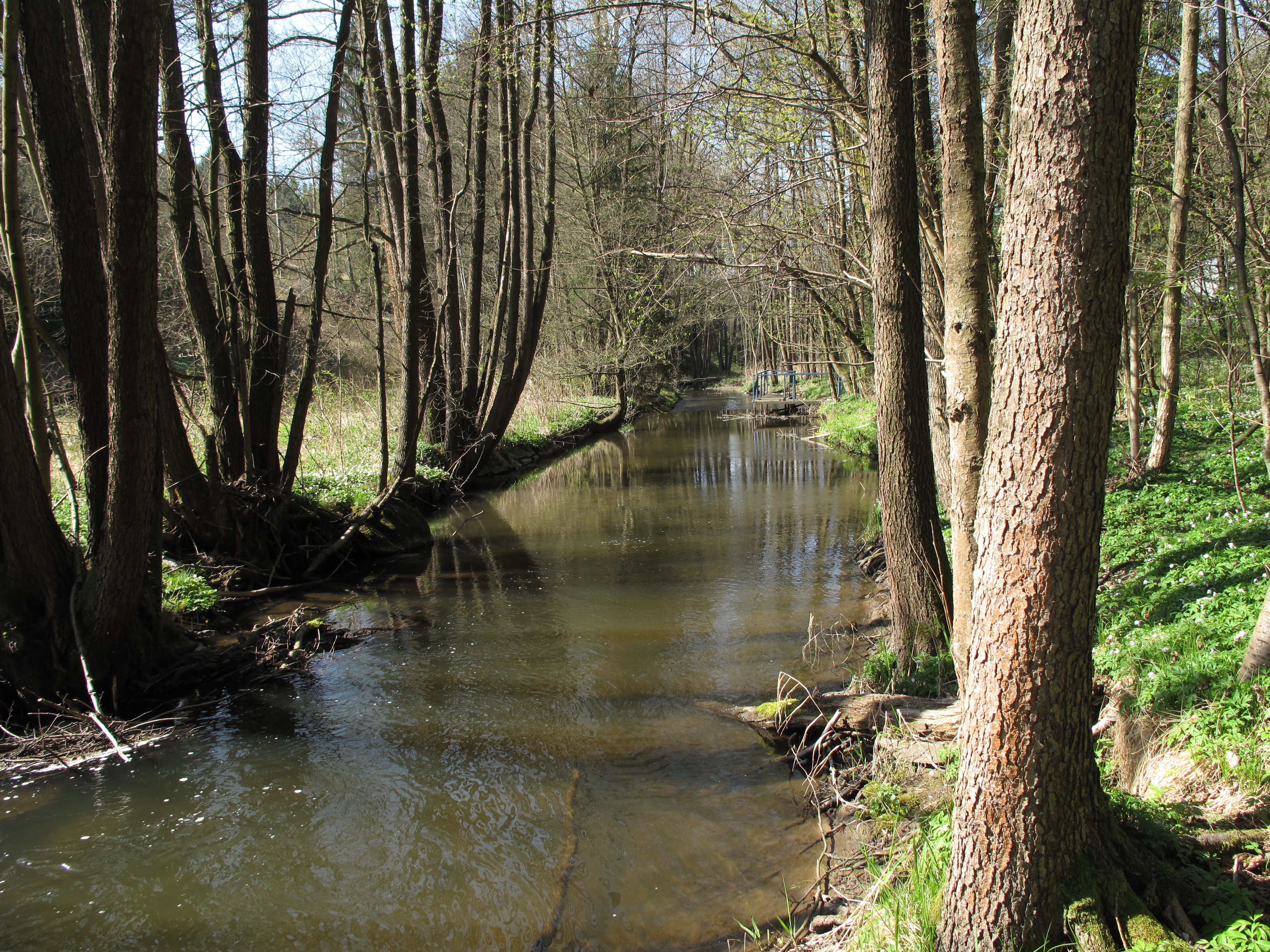 Jankovský potok u Hojkovů. Okres Pelhřimov, Česká republika.